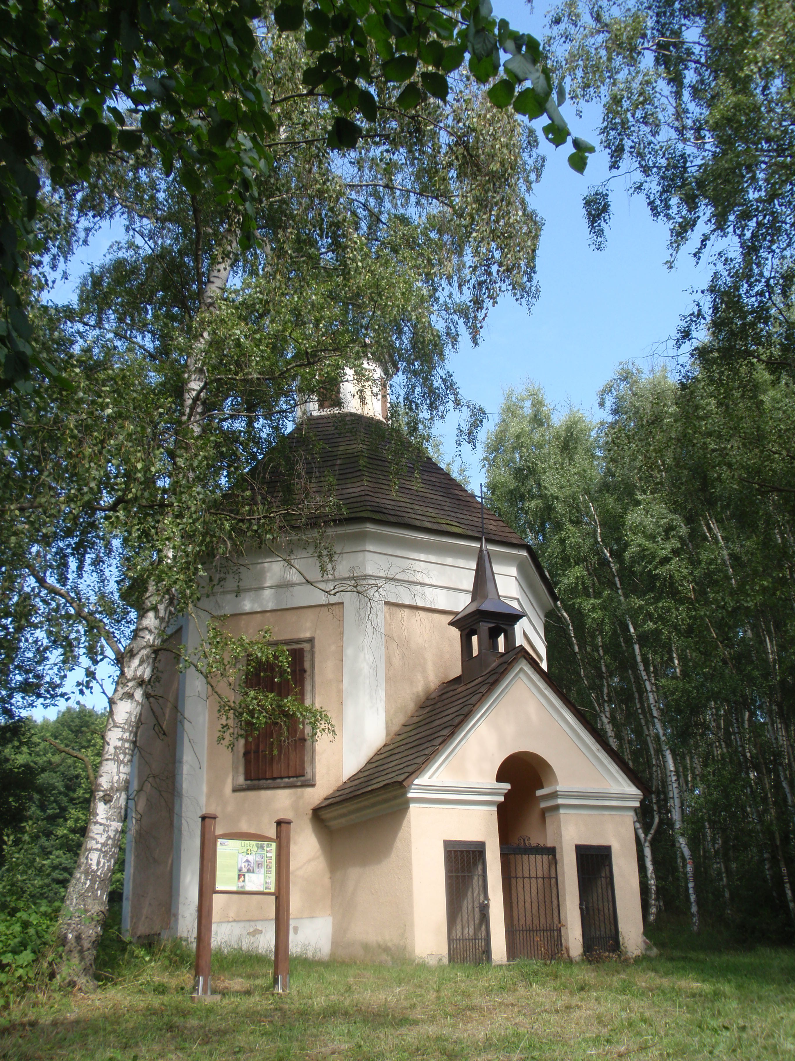 Kaple sv. Karla Boromejského (Telč), Telč